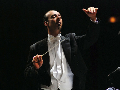 المايسترو نادر عباسى